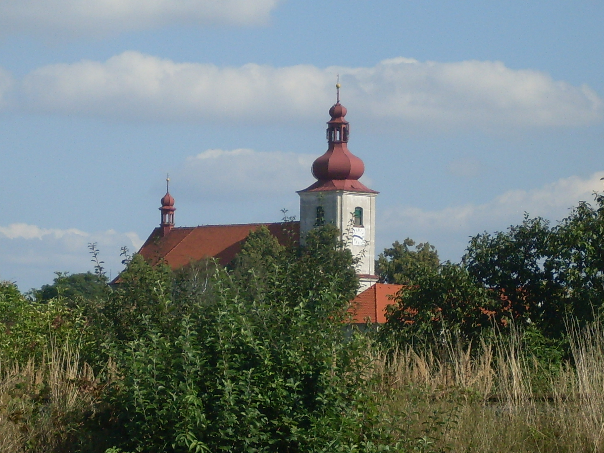 Kostel sv. Petra a Pavla v Podbořanech